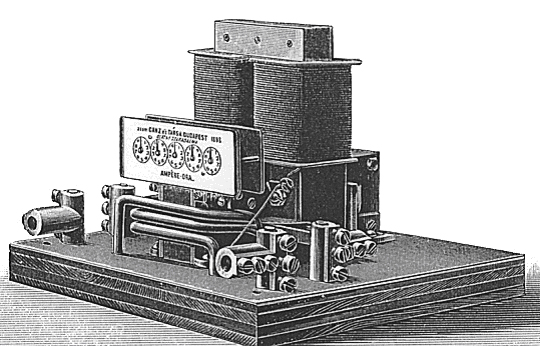 Bláthy Ottó Titusz "Ferraris elv"-en működő egyfázisú váltakozó áramú indukciós fogyasztásmérője.